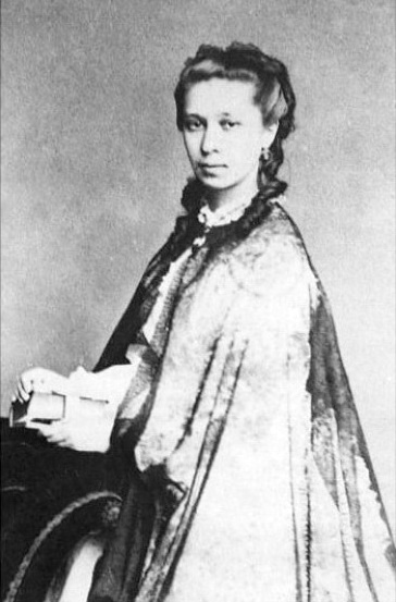 Марыя Грушэцкая, жонка Віктара Каліноўскага. Памерла ў 1900